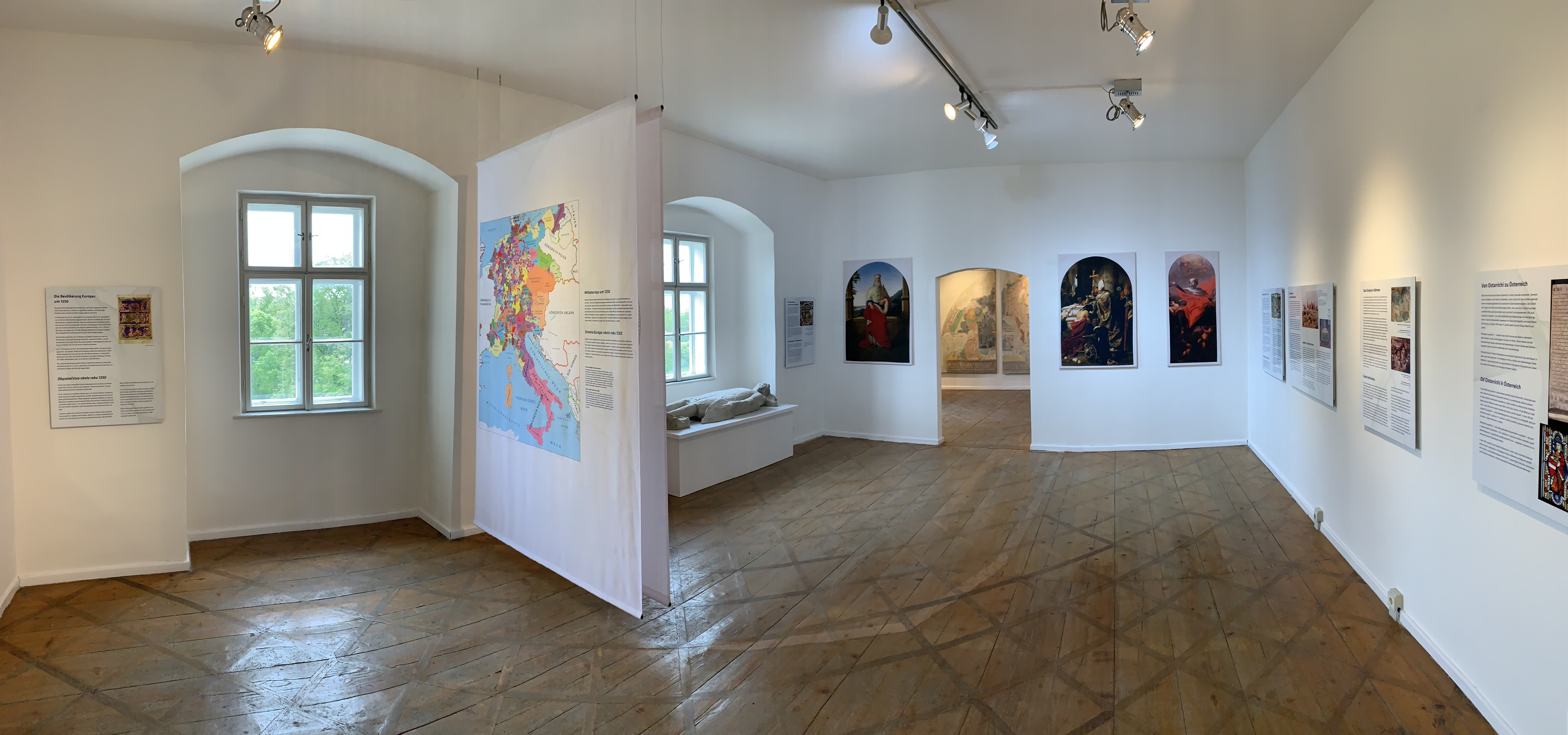 Blick in den zweiten Raum der Ausstellung zur Schlacht auf dem Marchfeld auf Schloss Jedenspeigen.